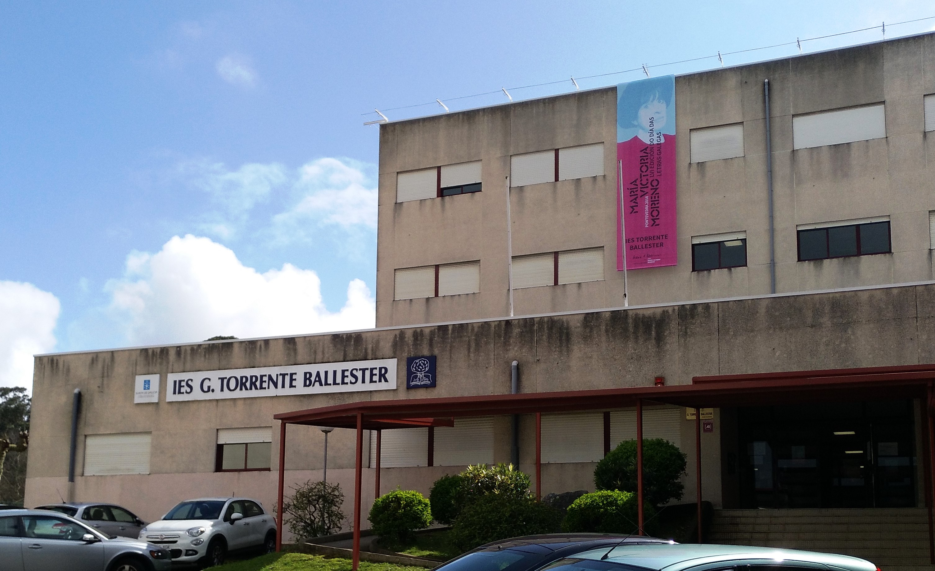 Exterior do IES G. Torrente Ballester de Pontevedra. Homenaxe a María Vitoria Moreno. Abril 2018